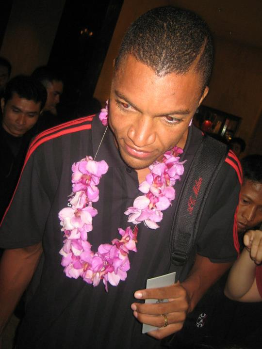 Nelson Dida sebagai pemain AC Milan Glorie di Jakarta awal September 2011